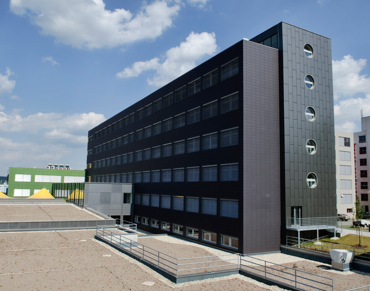 Budova Fakulty elektrotechniky a komunikačních technologií Vysokého učení technického v Brně na Technické 10